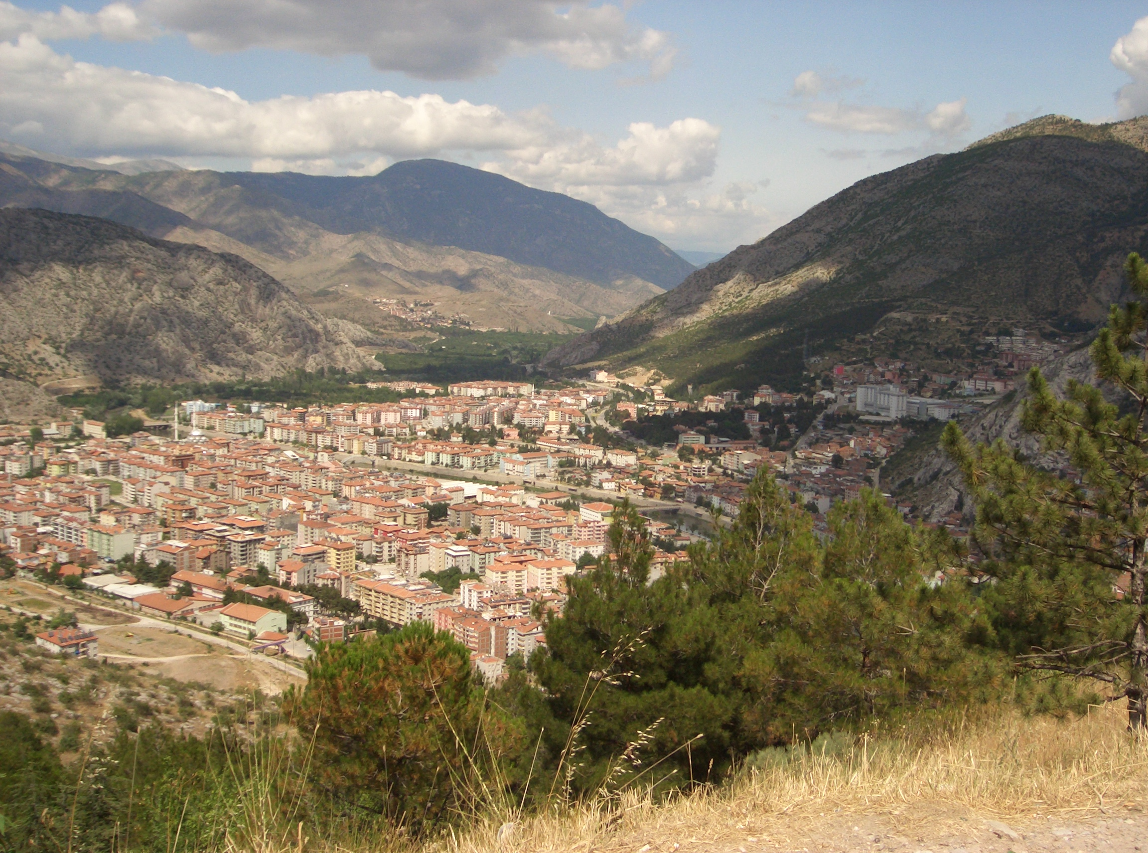 Amasya'ya bakış